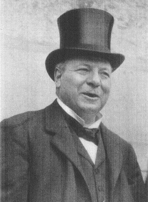 Richard Burdon Haldane, 1st Viscount Haldane